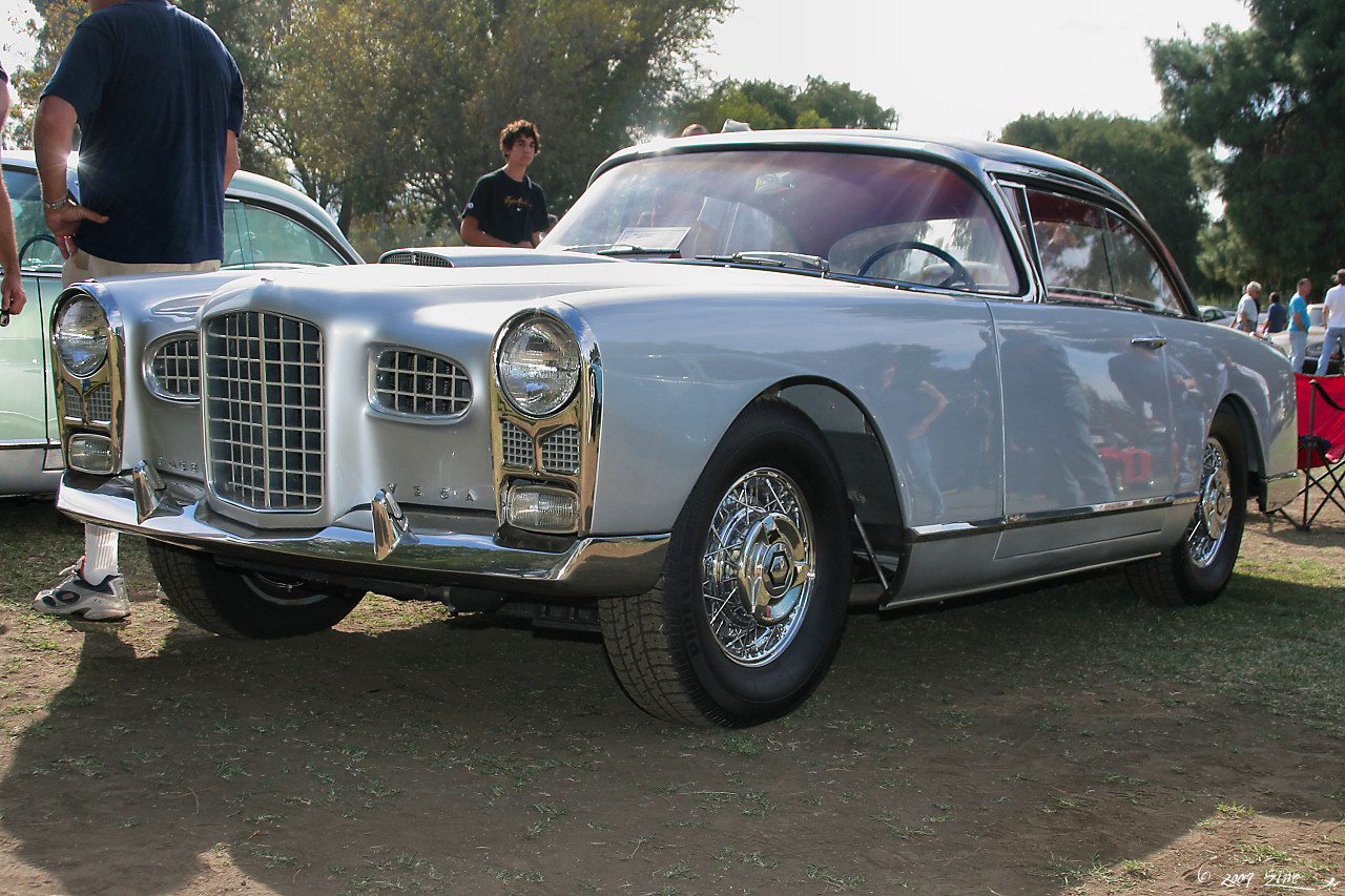 1956 Facel Vega FV2B in West Van Nuys, Van Nuys, CA, US.